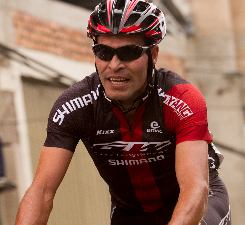 Elites Hombres Campeonatos Nacionales de Ruta Boyará 2016. Français cadien: Frank Osorio en plein effort lors de la course en ligne Élite des Championnats de Colombie 2016.